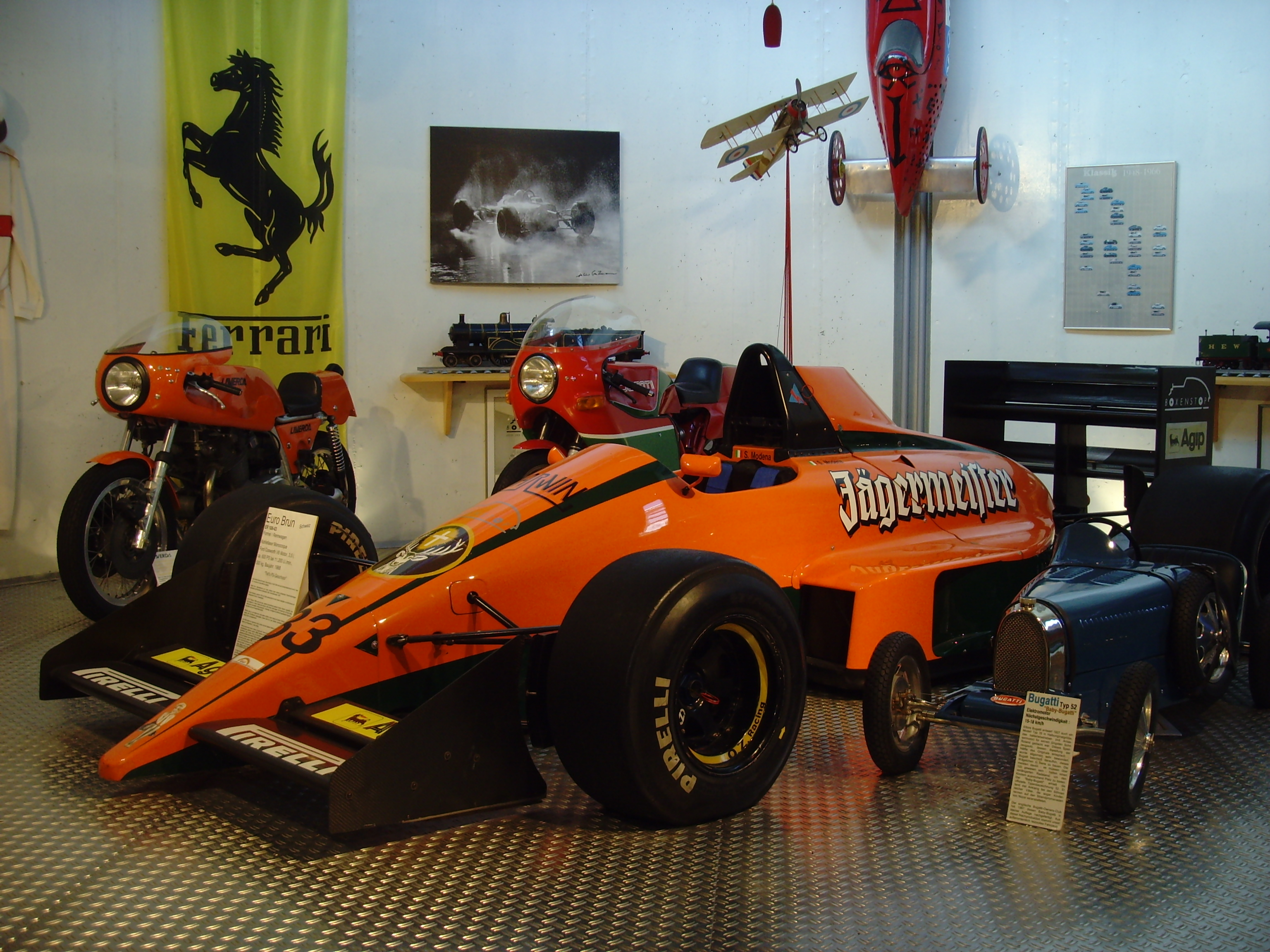 Euro Brun